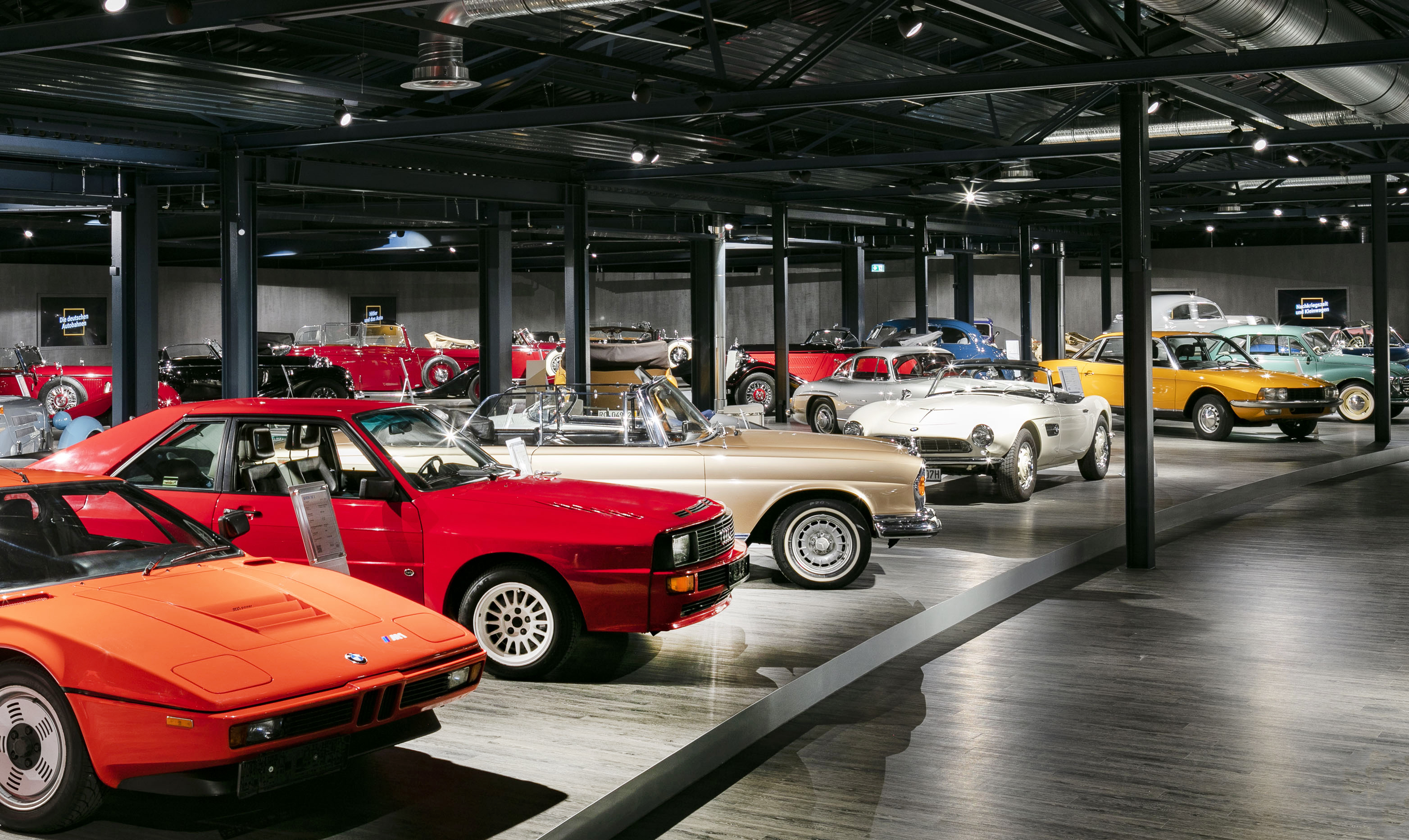 Bild zeigt Fahrzeuge der Ausstellung